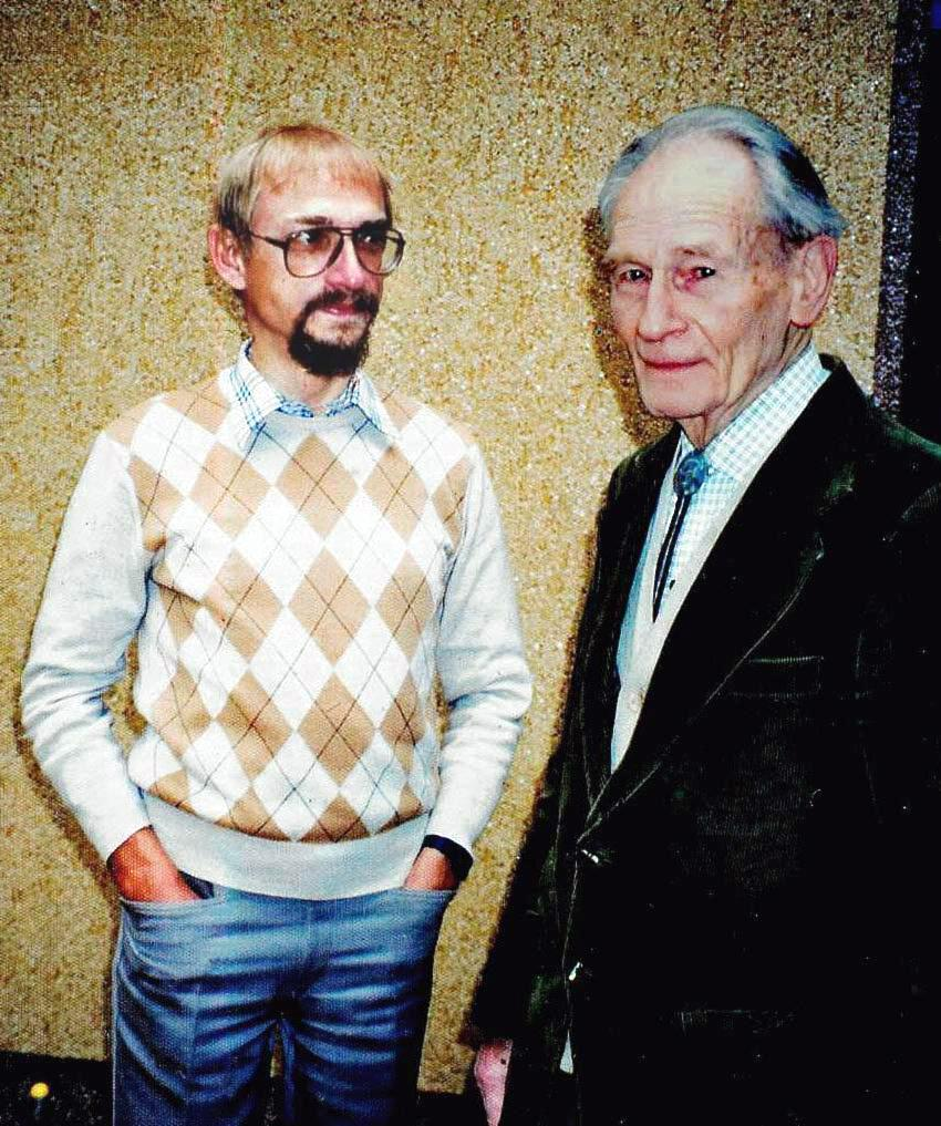 Mai 1989: Karl Helbig zu Gast bei Rüdiger Siebert, etwa 2 1/2 Jahre vor seinem Tod